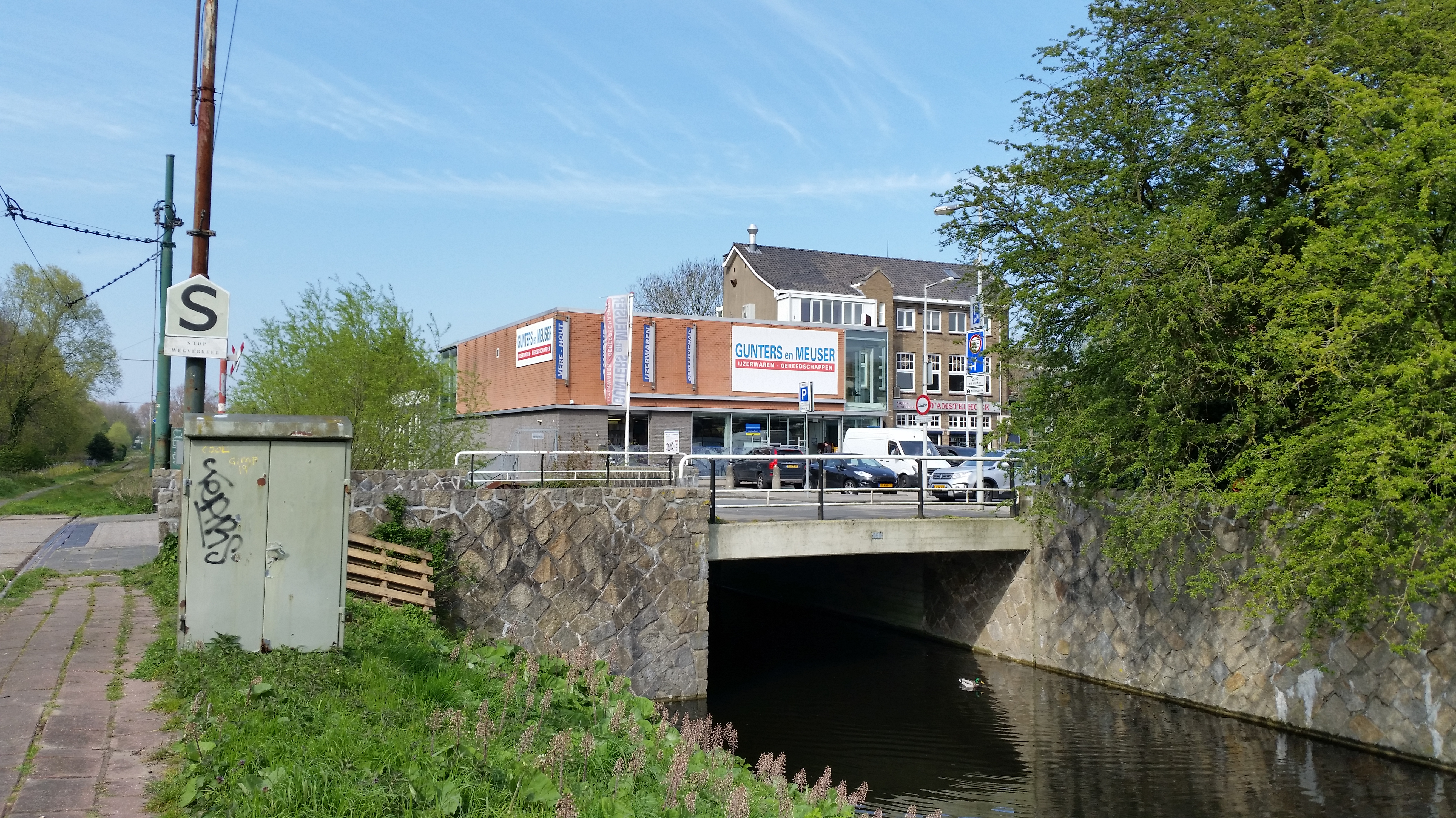 Zijaanzicht van Brug 590 (in Amsterdam)